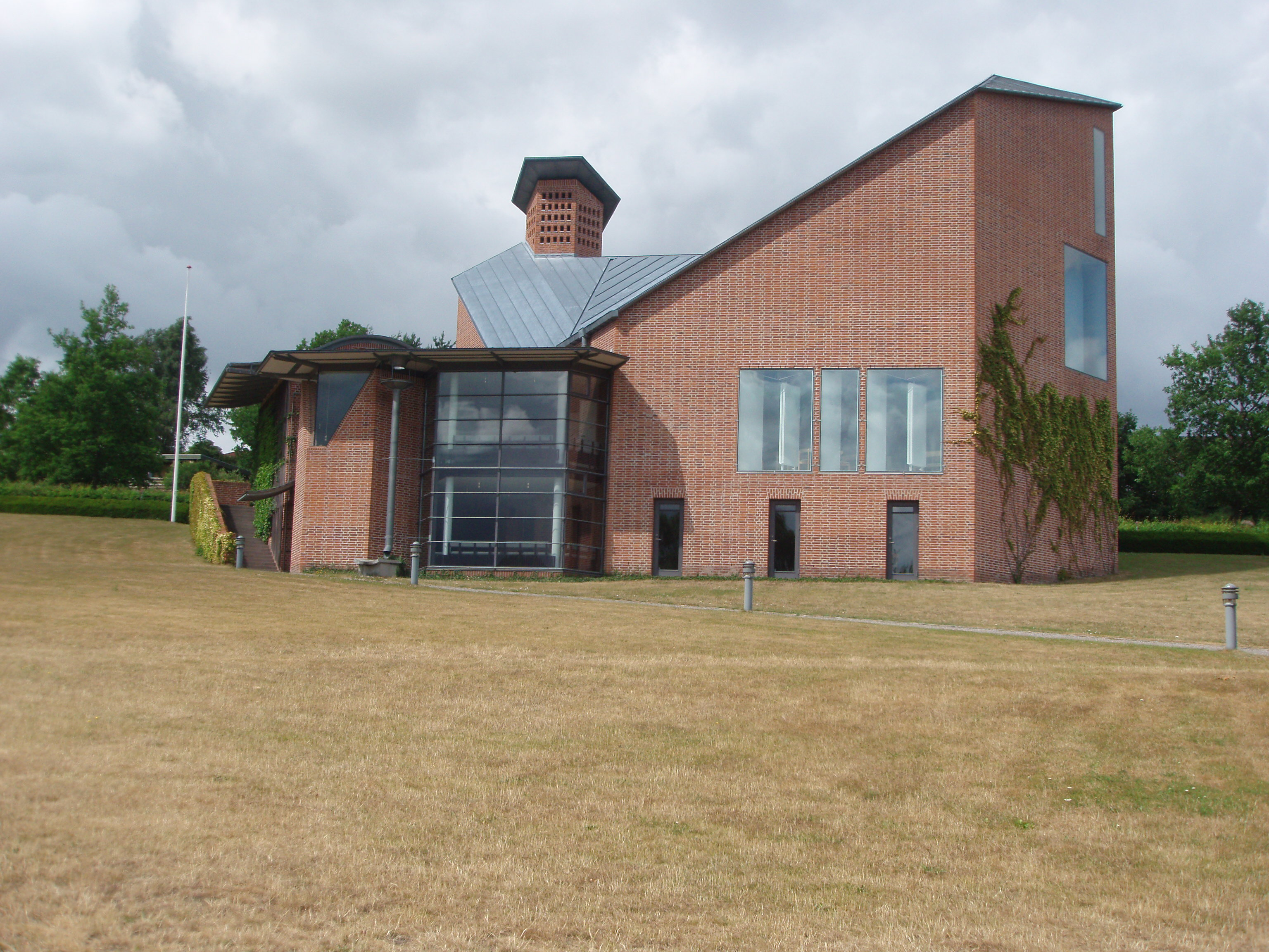 Virkund Kirke